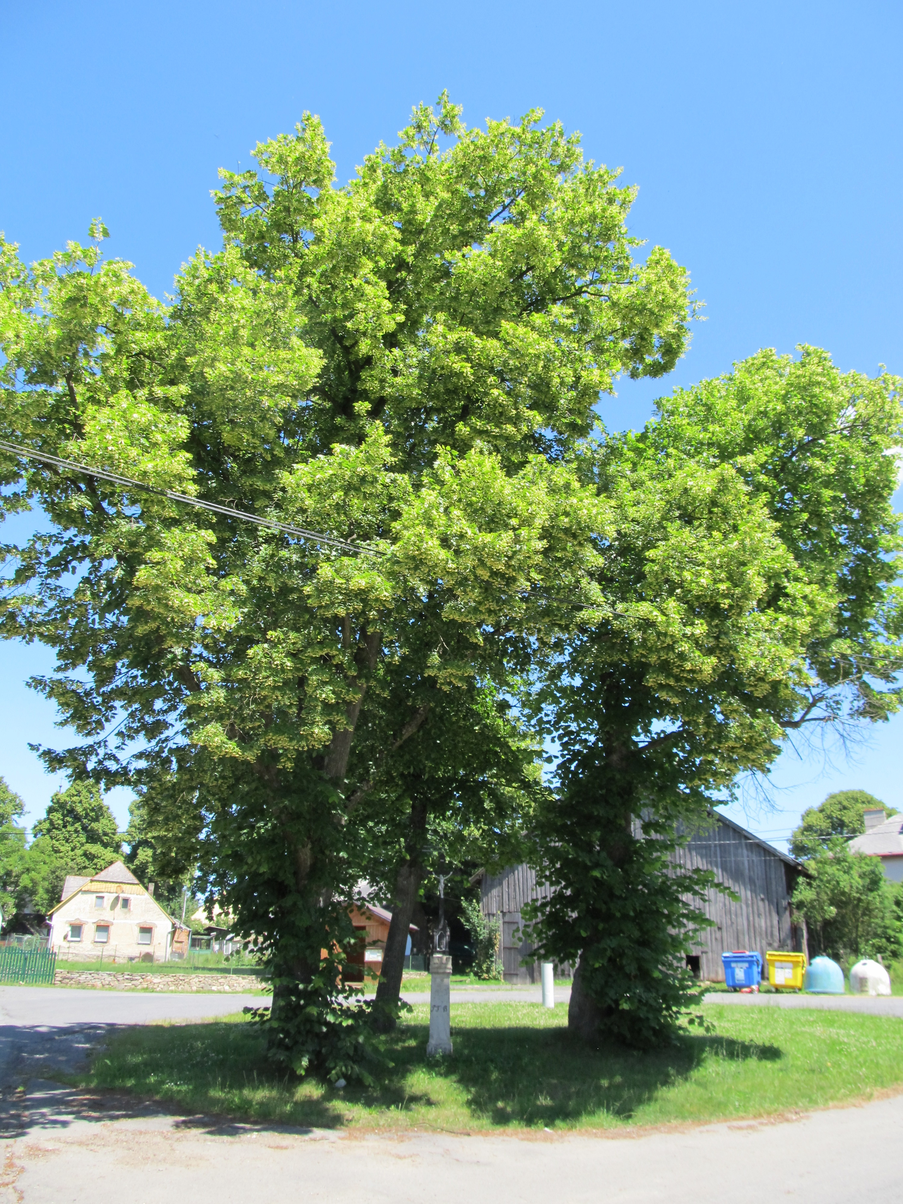 Hadrava - náves